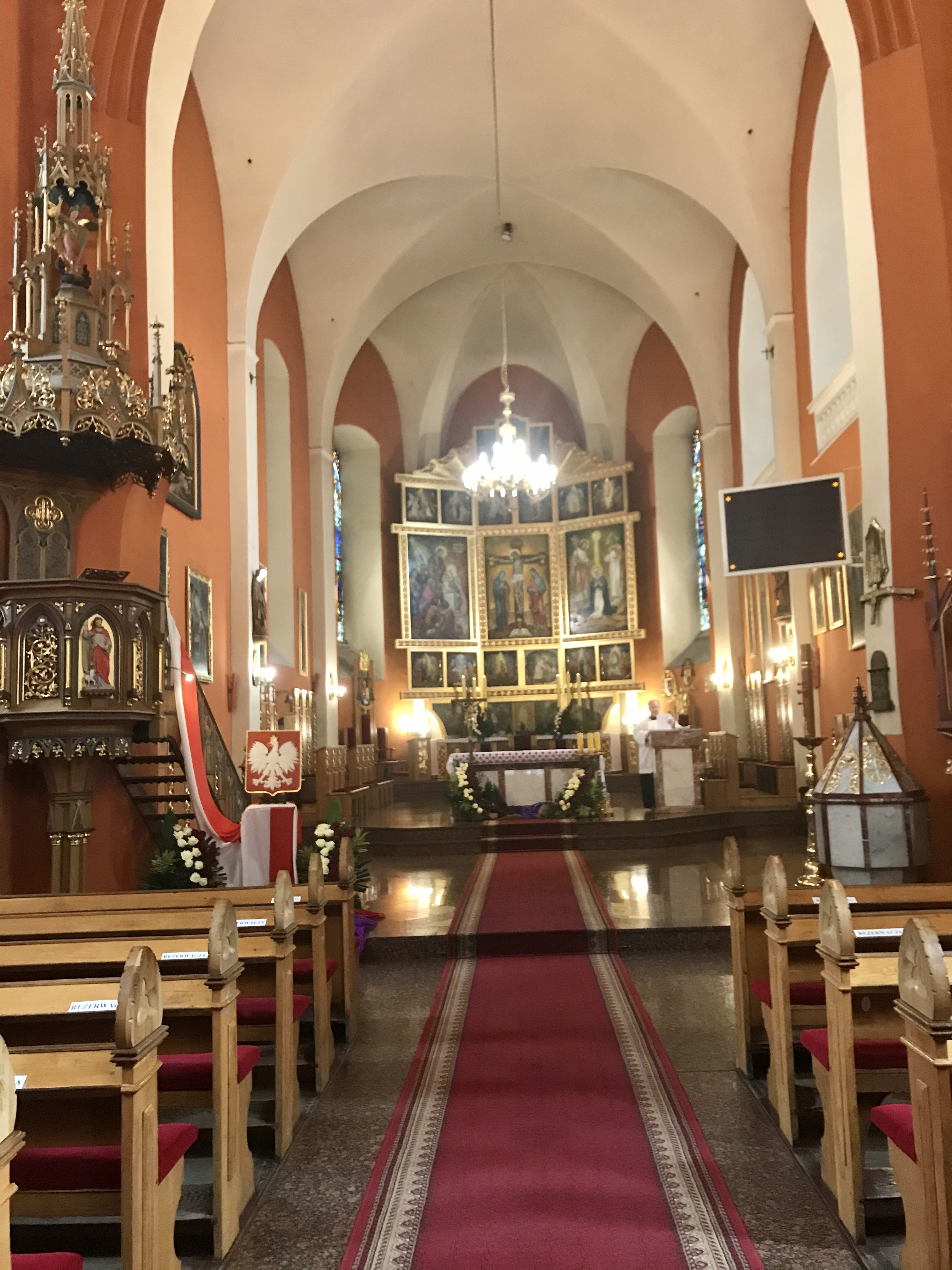 Widok na prezbiterium z nawy głównej konkatedry w Zielonej Górze